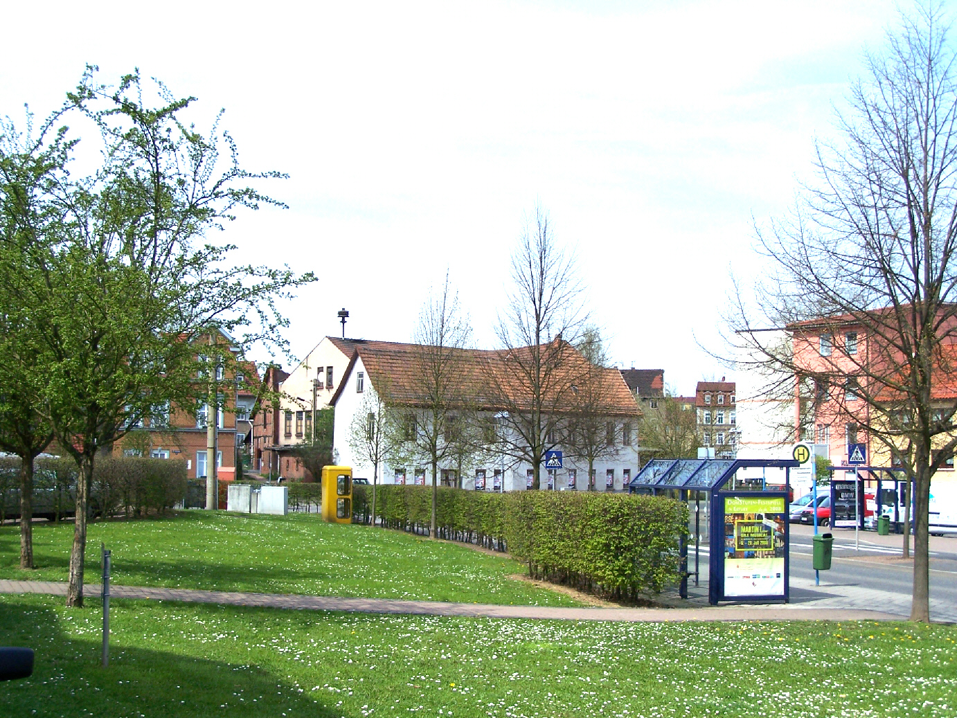 Das westliche Ende der Katharinenstraße wurde zum Ende des 19. Jahrhunderts im Zusammenhang mit der angrenzenden Elisabethenschule (banannt nach einer mecklenburgischen Prinzessin) als Elisabethplatz bezeichnet.